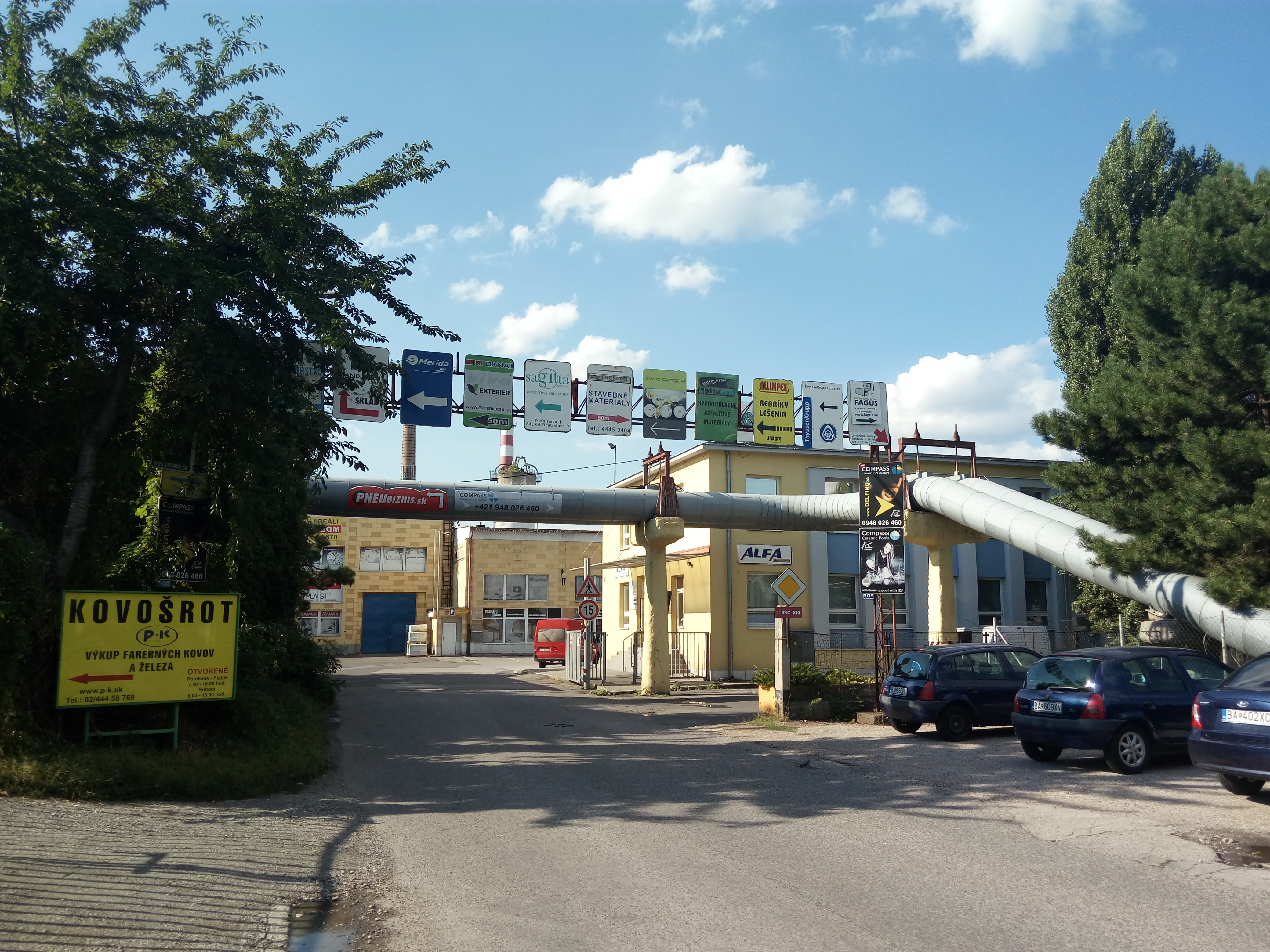 Turbínová 1, Nové Mesto, Bratislava